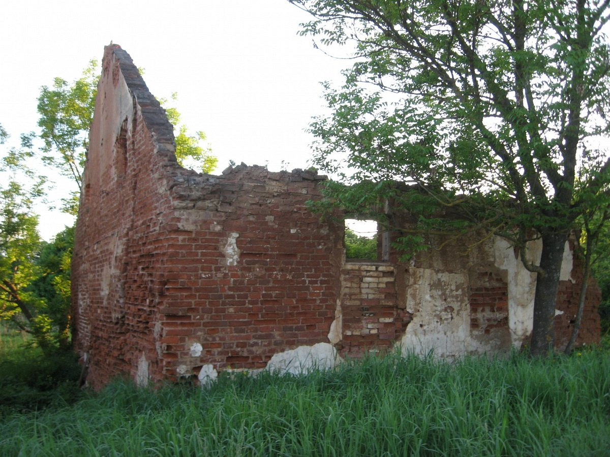 Вялікі Двор. Рэшткі гаспадарчых пабудоў